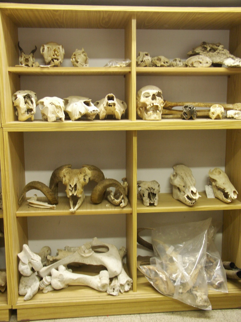 Archaeozoology עצמות בעלי חיים שנמצא בחפירה ארכאולוגית פרהיסטורית גולגלות בארון השלדים של המעבדה לארכאוזואולוגיה באוניברסיטת חיפה